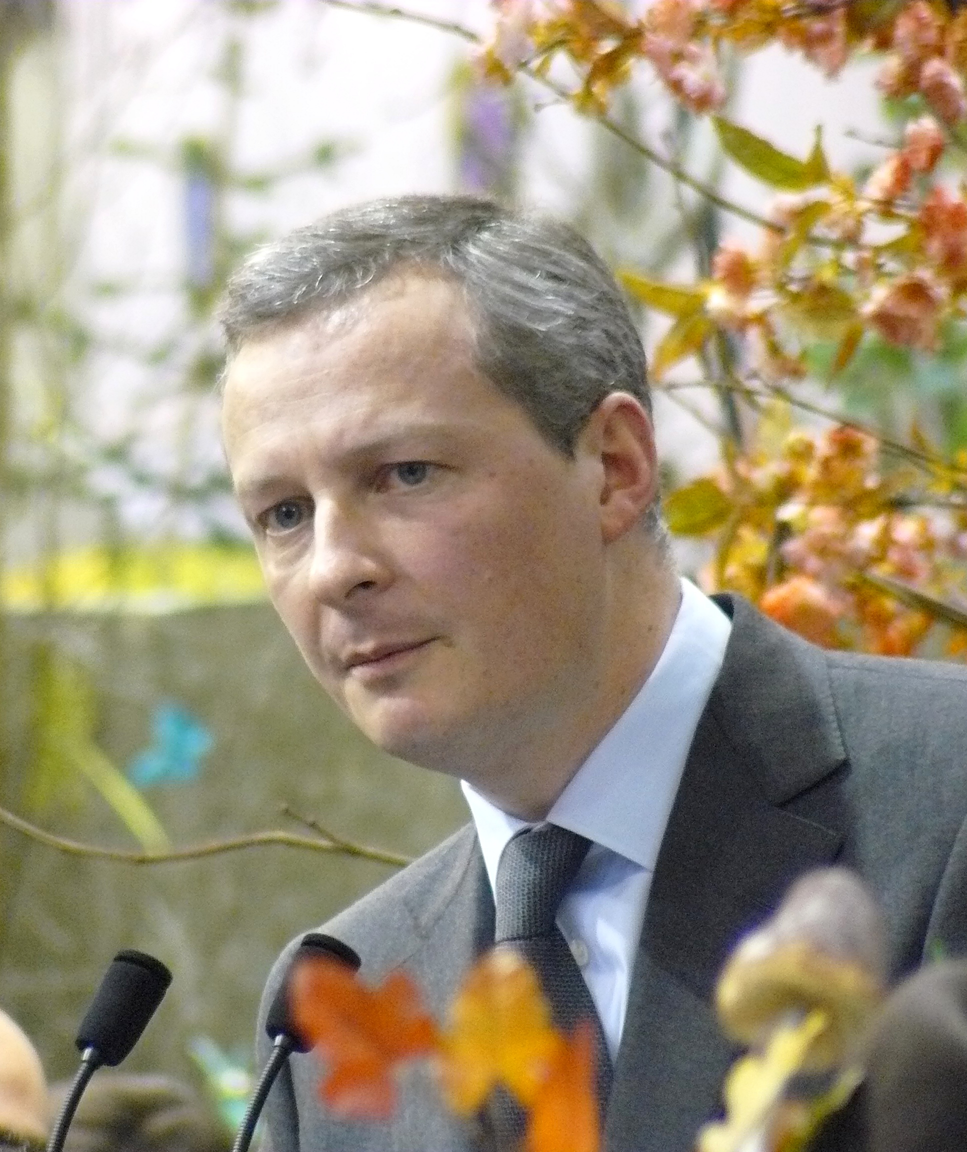 Bruno Le Maire, le 2 mars 2010, lors de a visite au Salon de l'agriculture à Paris en tant que ministre de l'agriculture.